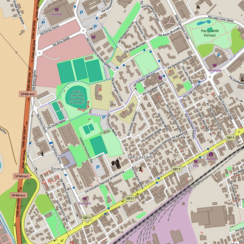 Mappa San Lazzaro Pomari